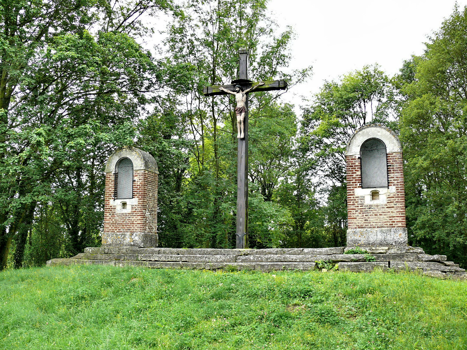 Catheux (Oise) : Le calvaire édifié au sommet de la motte castrale au début du XIXe siècle.